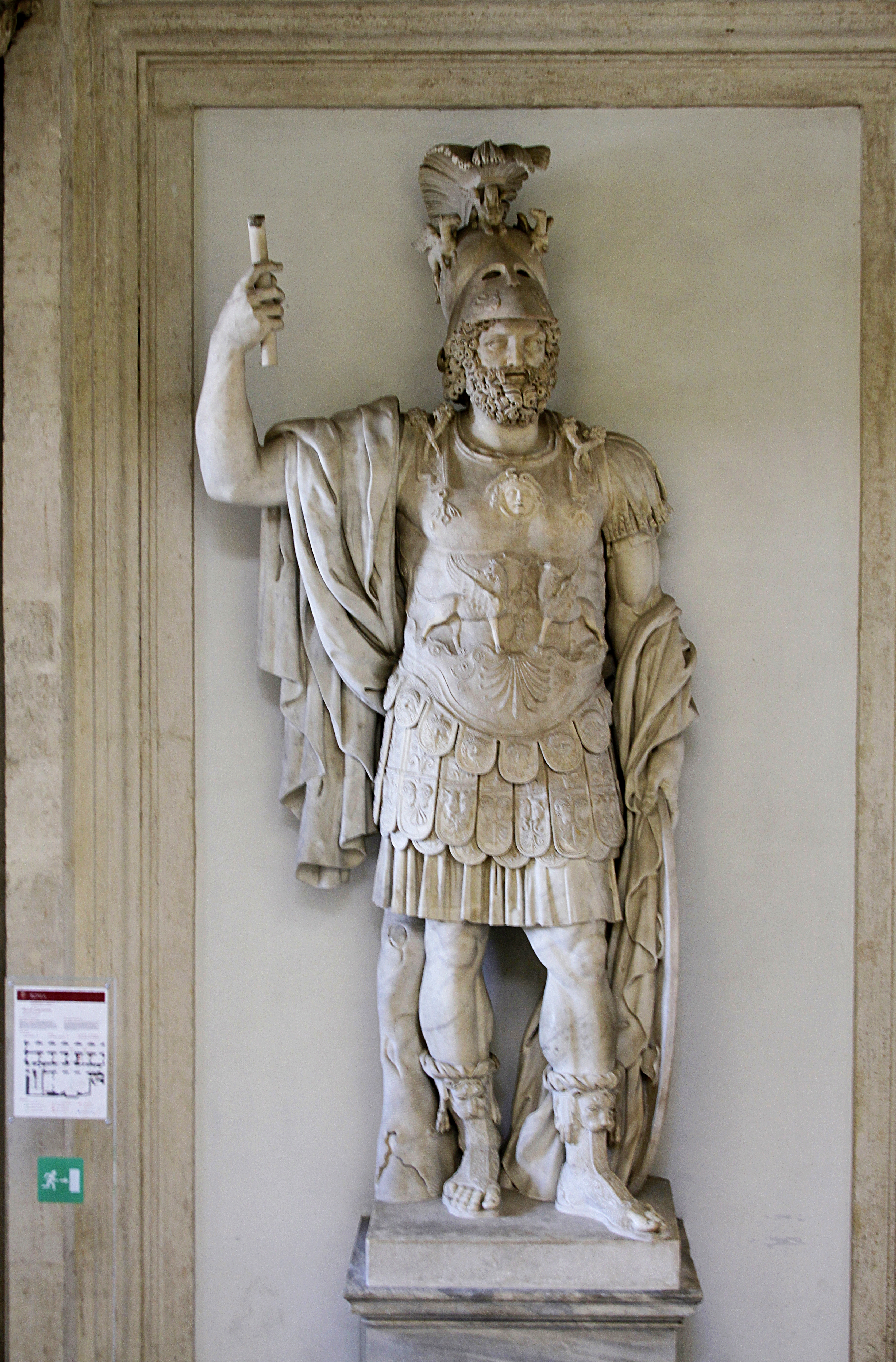 Palazzo Nuovo - Musei Capitolini - Rome